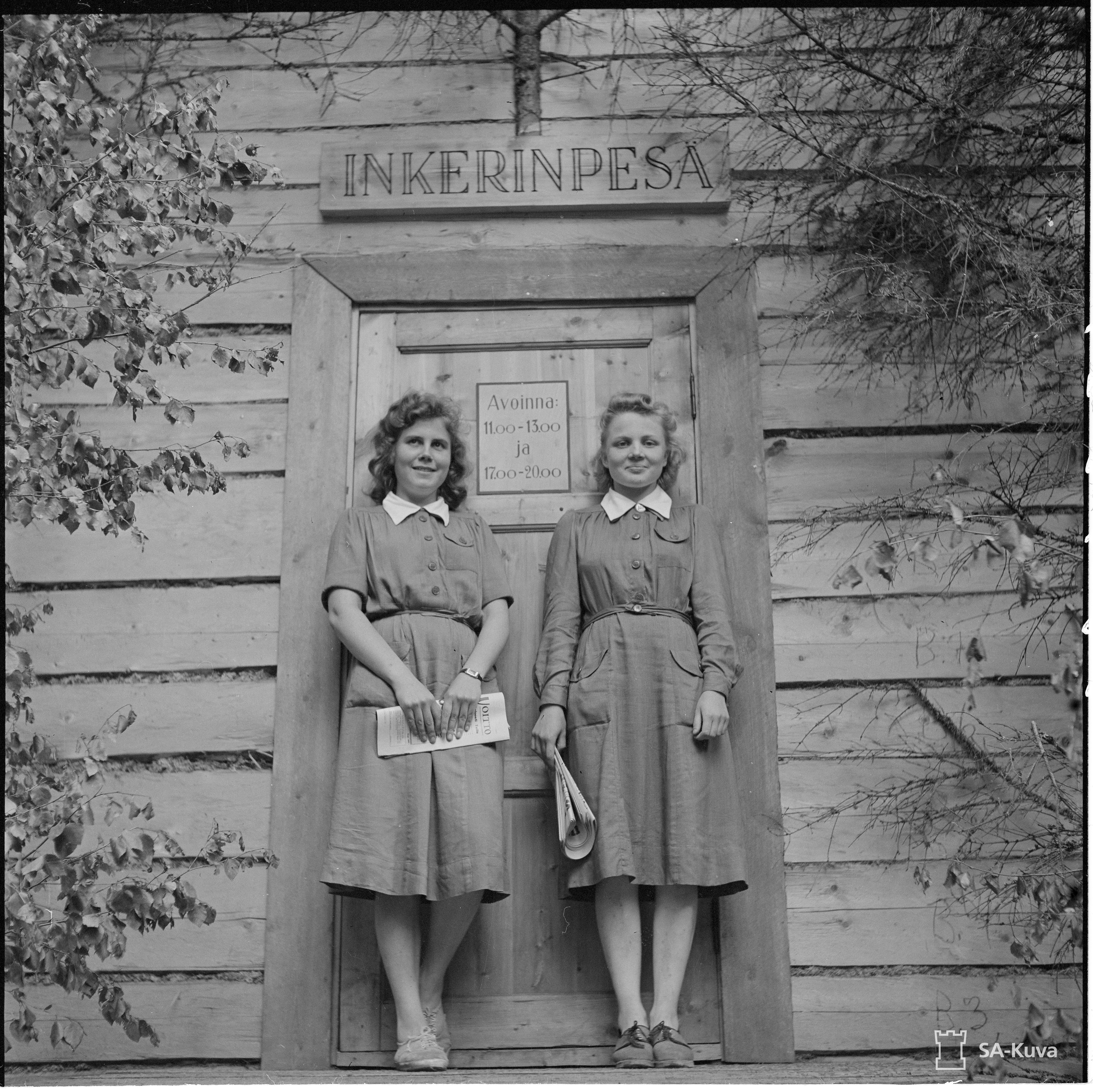 Inkerinpesän sotilaskotisisaret Maija Myyryläinen ja Raili Kilpeläinen 30.6.1943